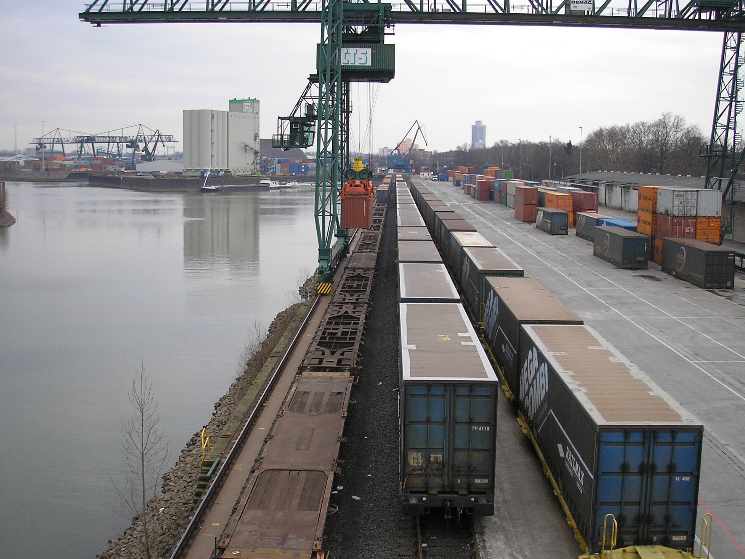 Hafen Niehl I, Containerumschlag